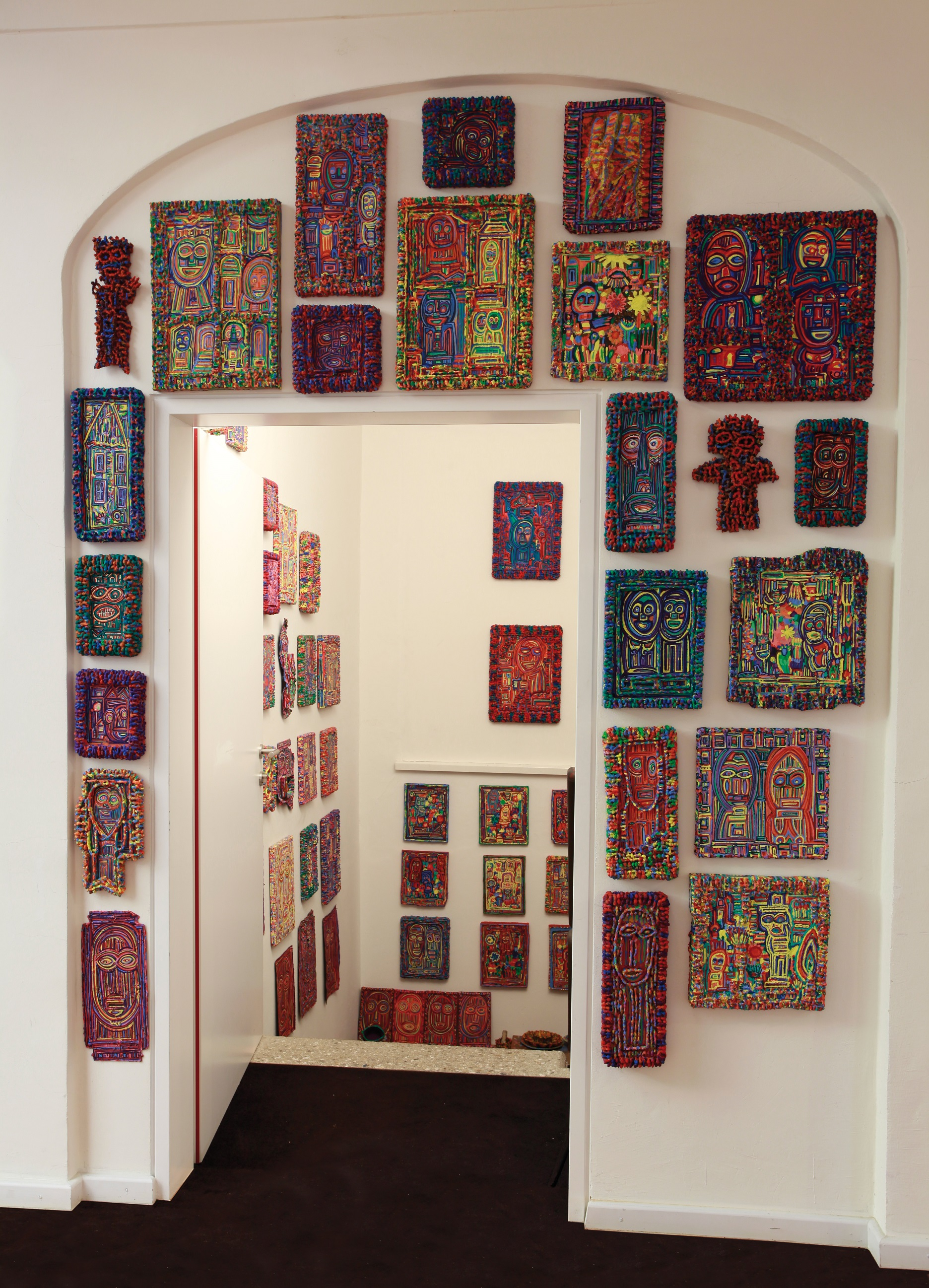 Abbildung einer von Alois Neuhold gestalteten und als Bildkapelle benannten Raumes